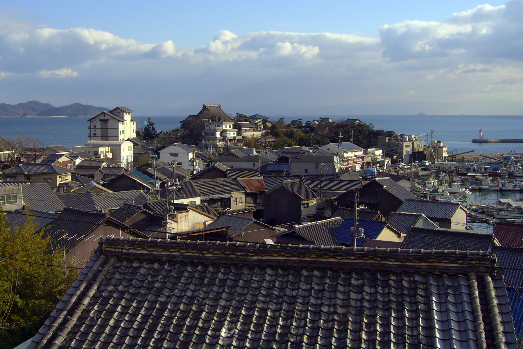 Tomonoura in Fukuyama, Hiroshima, Japan